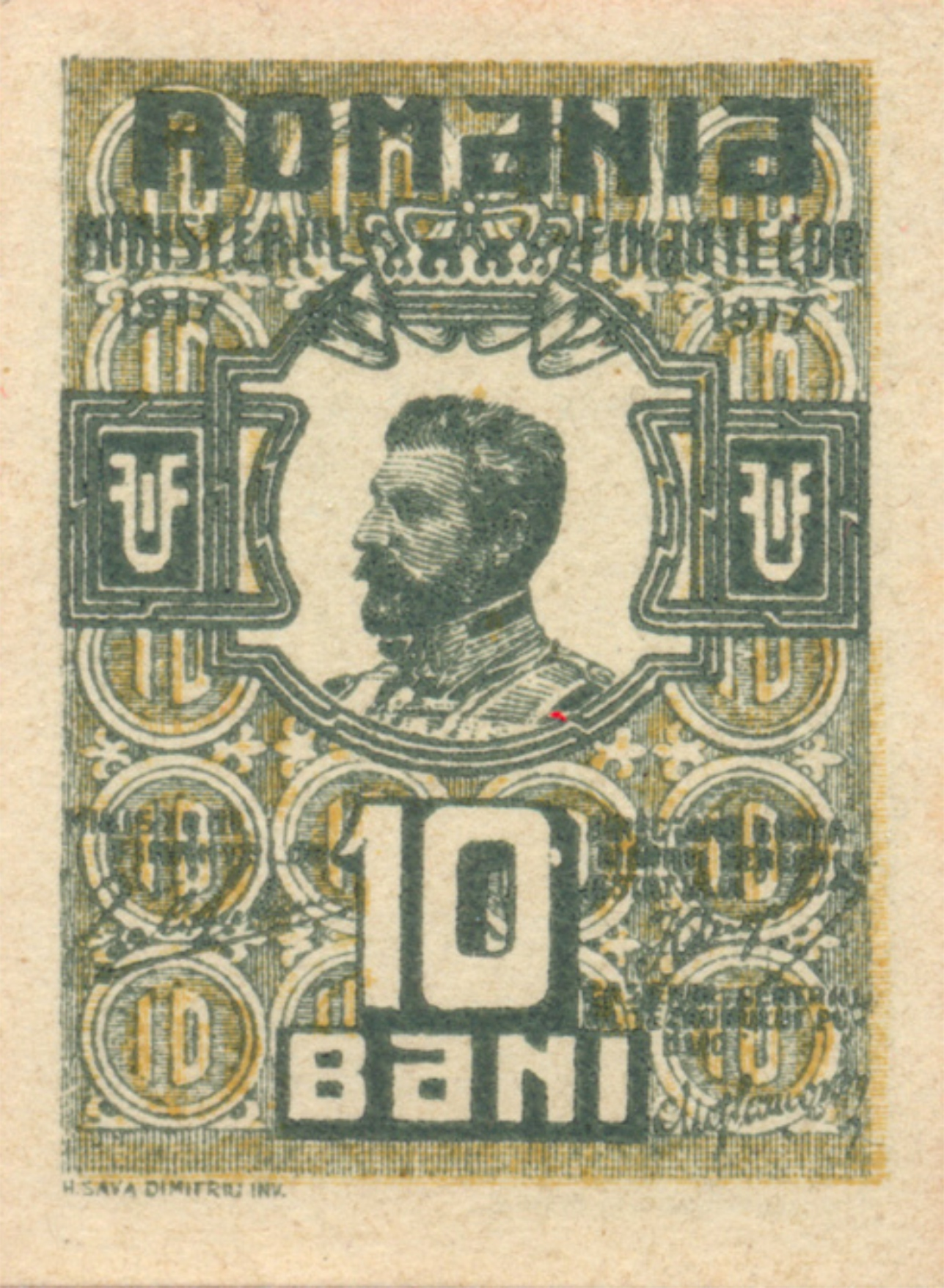 10 bani banknote